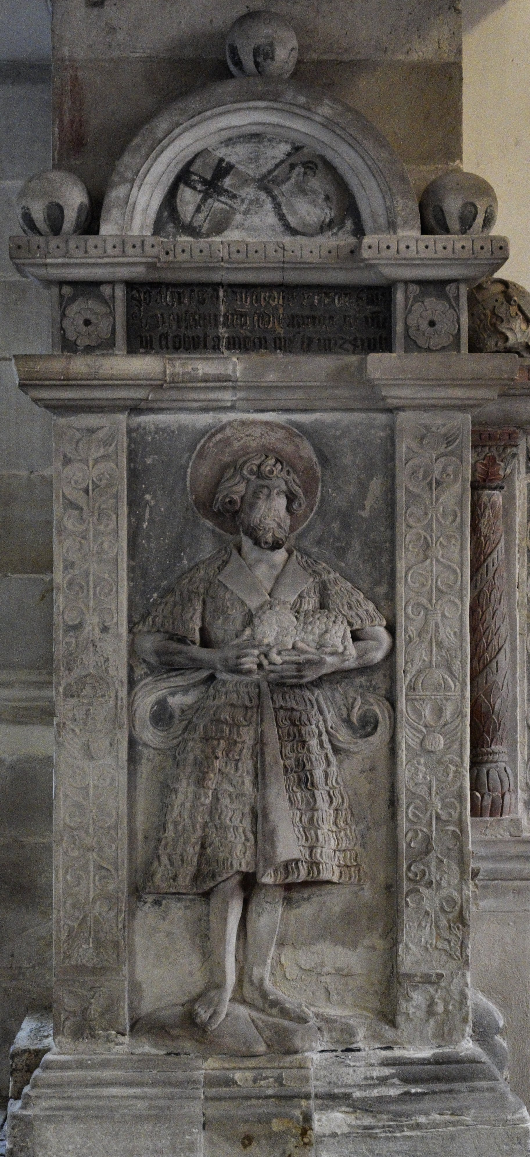 Dom St. Johannes und St. Laurentius in Merseburg im Saalekreis in Sachsen-Anhalt/Deutschland, Epitaph für den Bischof Johann III. von Werder († 1466), Darstellung: Johannes der Täufer